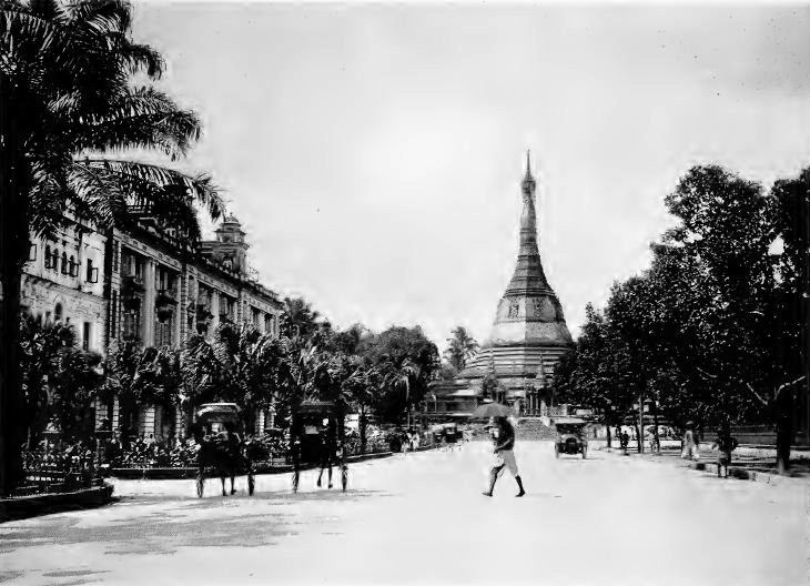 Sule Pagoda Rd, Rangoon